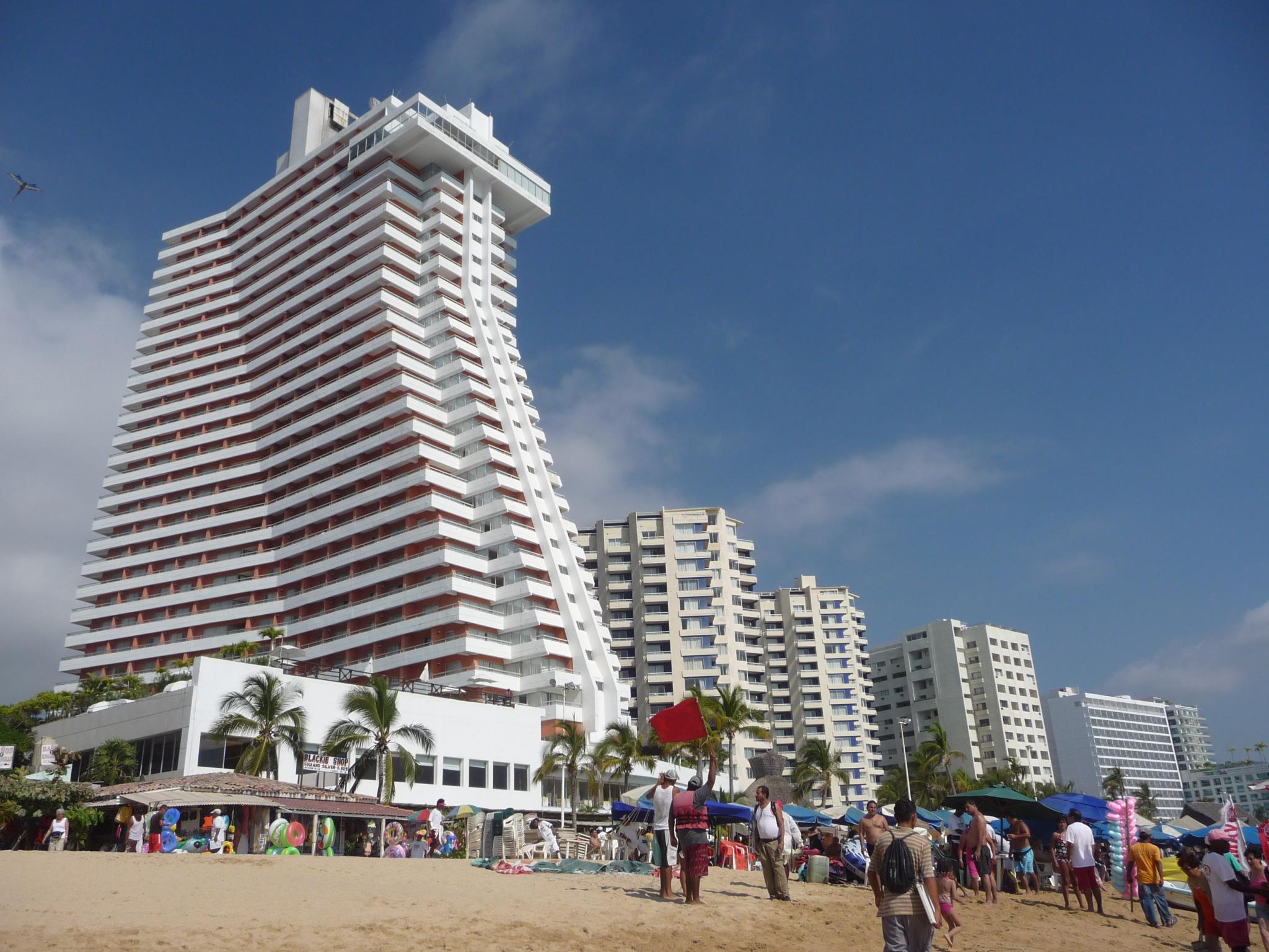 Edificio del Hotel Crowne Plaza en Acapulco, Guerrero, México.